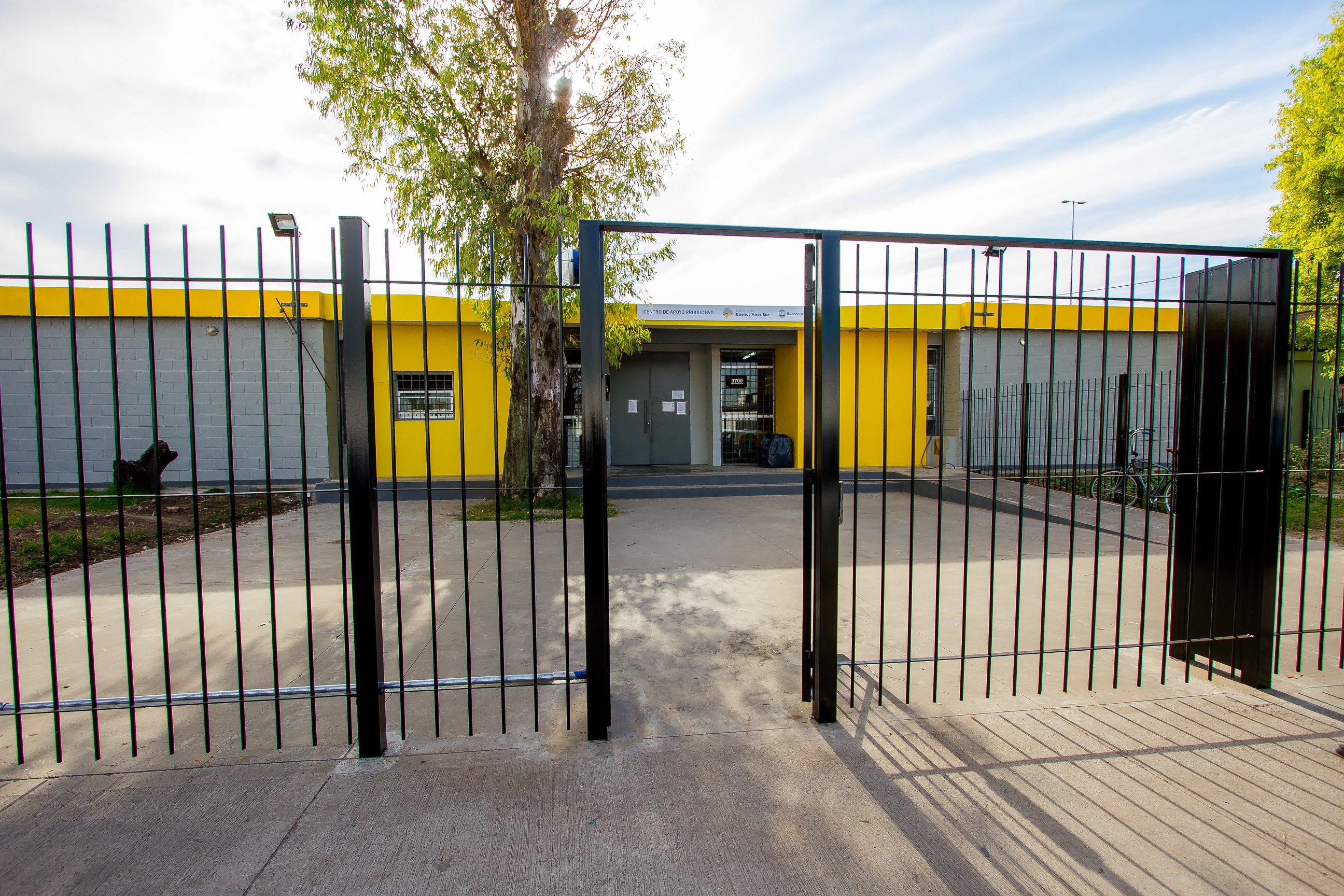 Obras en el barrio Los Piletones, Villa Lugano, Ciudad Autónoma de Buenos Aires.